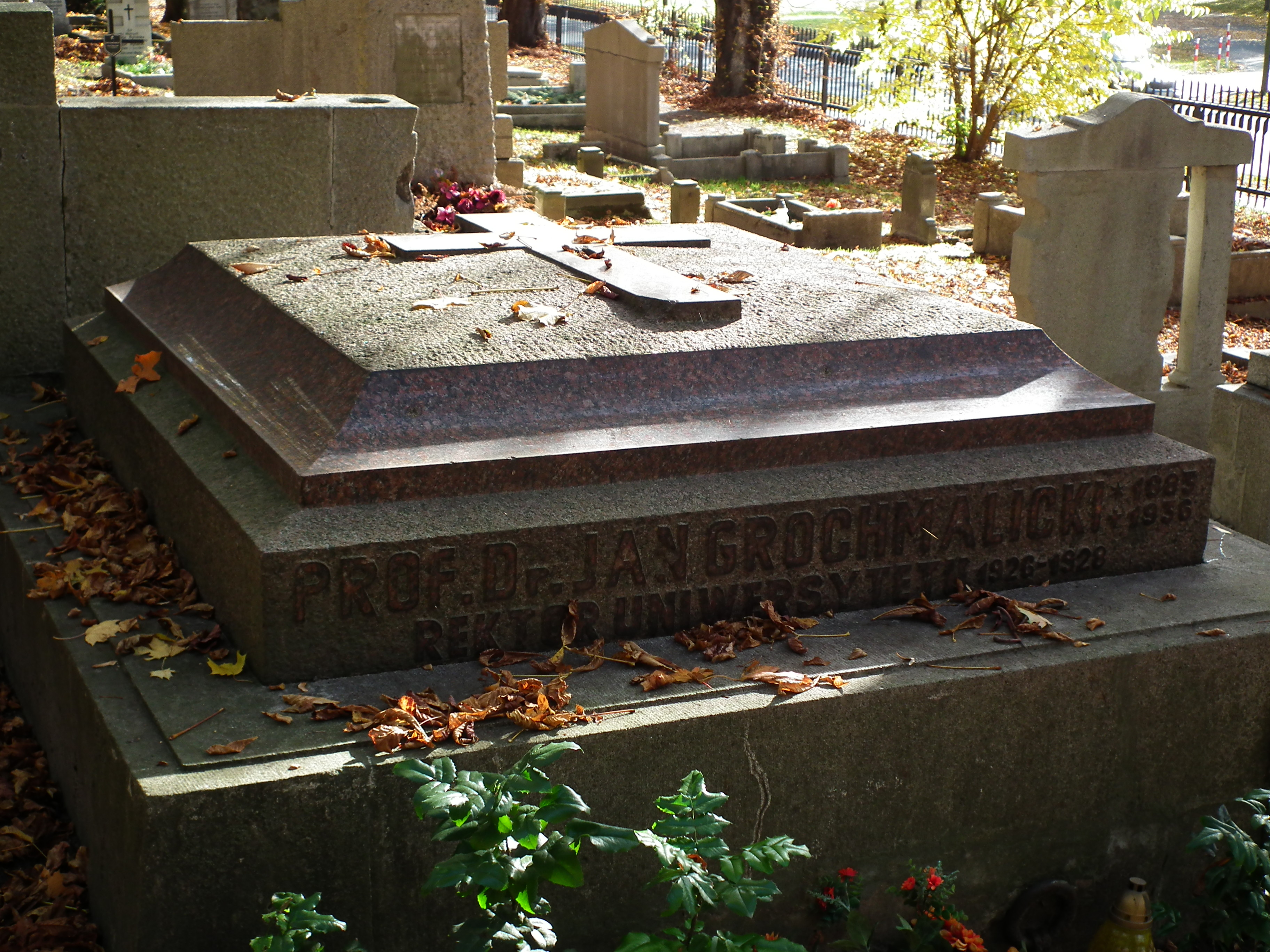 Grób Jana Grochmalickiego na cm. św. Wojciecha w Poznaniu, Cytadela.